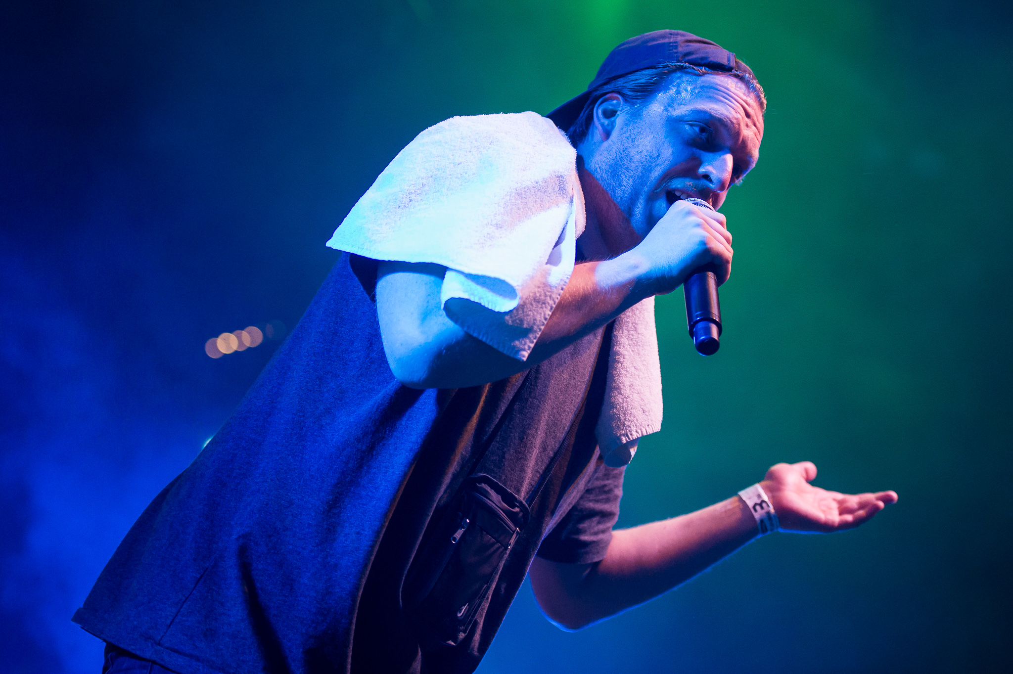 ARGO-Konzerte,Alternarena,Festival,Karate Andi,Konzert,Livekonzert,Livemusik,Musik,RiP,Rock im Park 2016